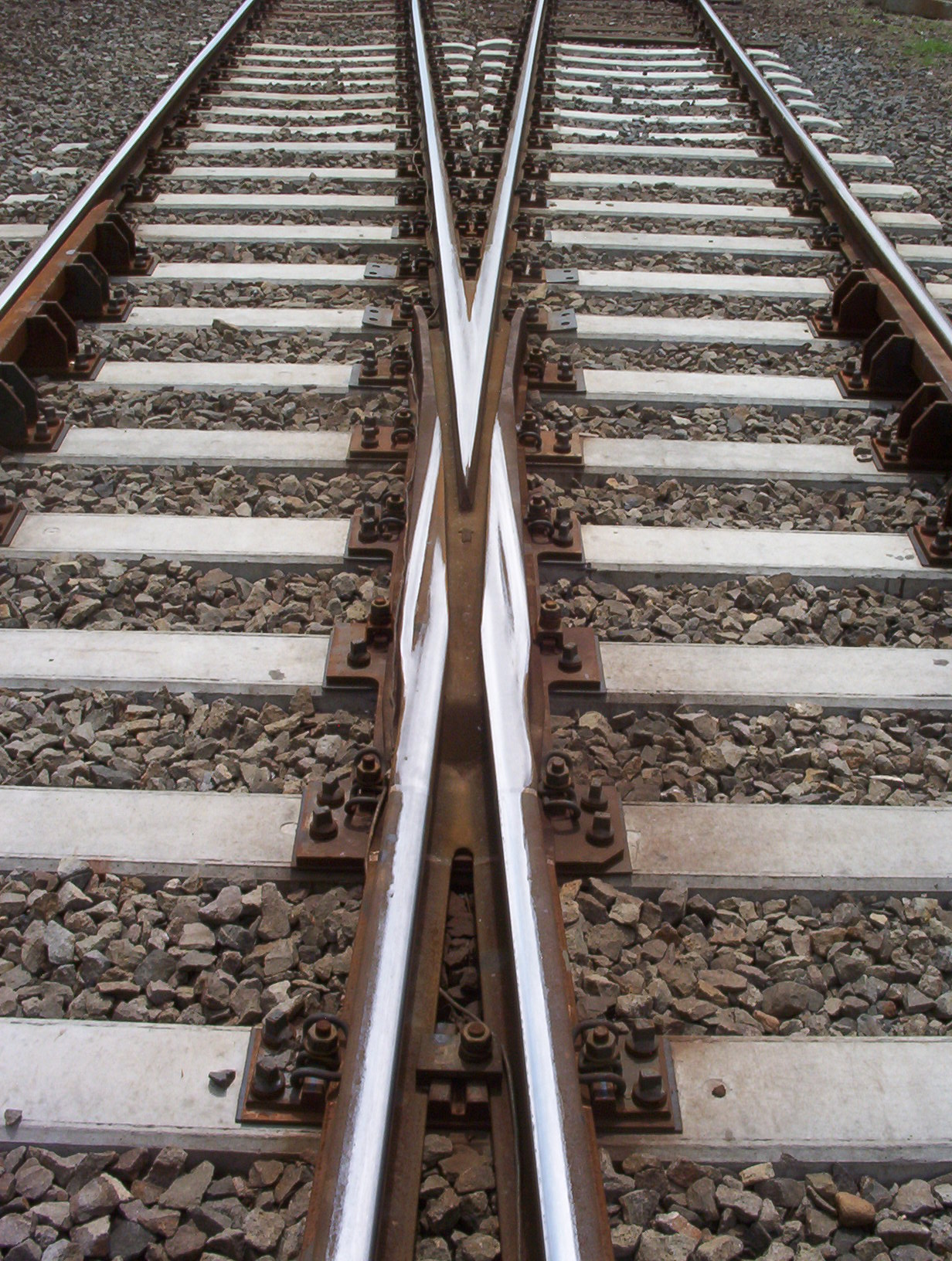 Keresztezési középrész (B54XI rendszerű) kitérőben (Kiskunlacháza vasútállomás)